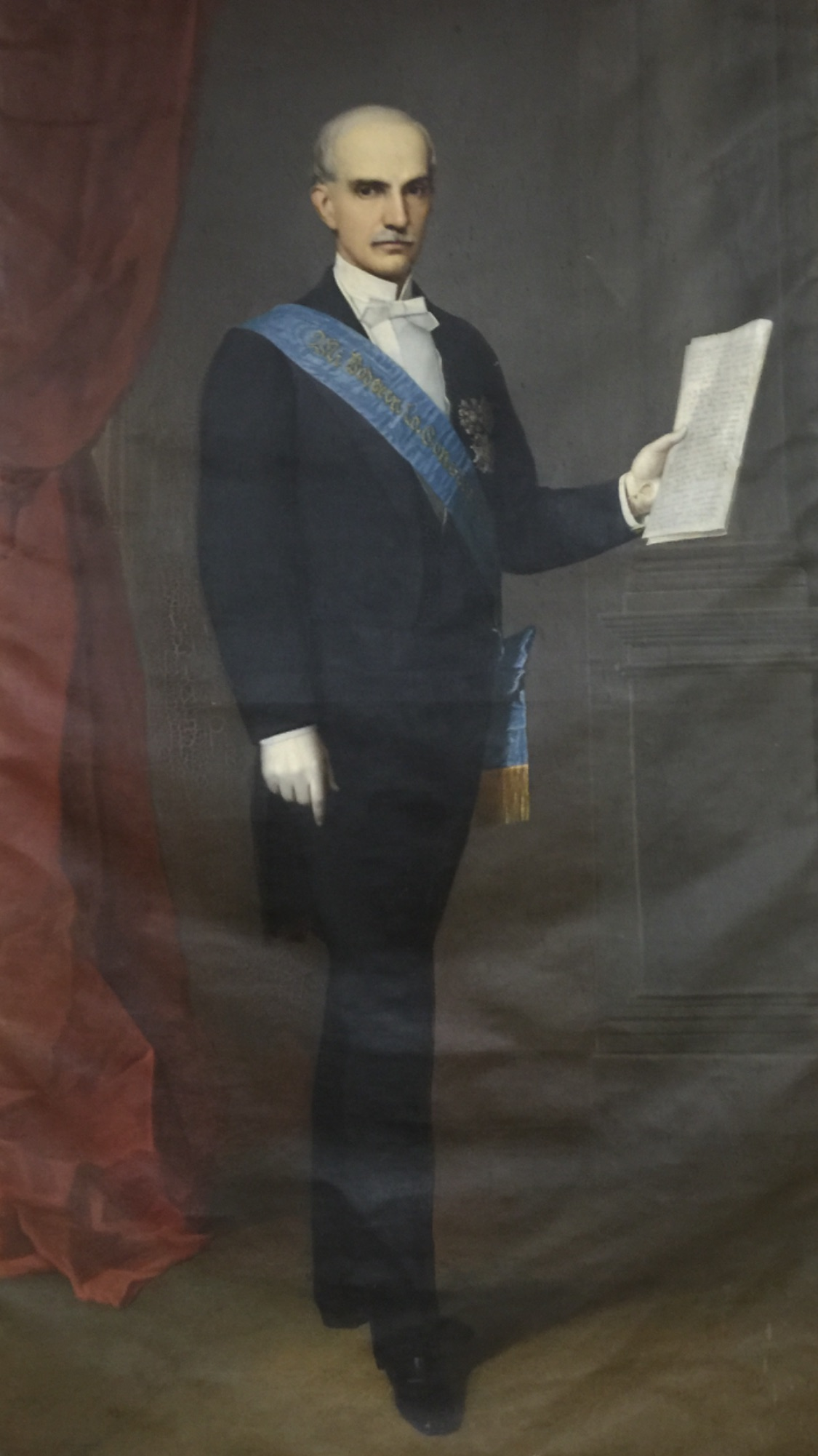 Retrato del Presidente Gabriel García Moreno pintado por Rafael Salas.